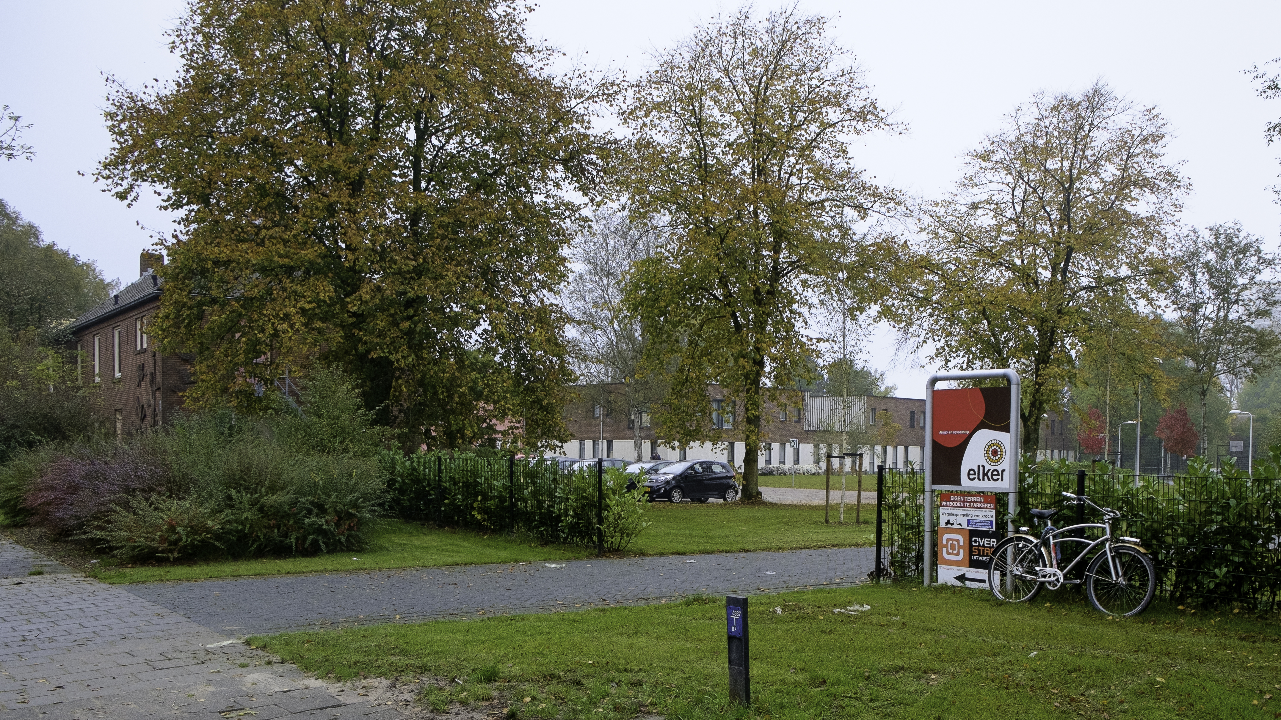 Toegang tot zorglocatie de Helper Haven van Elker